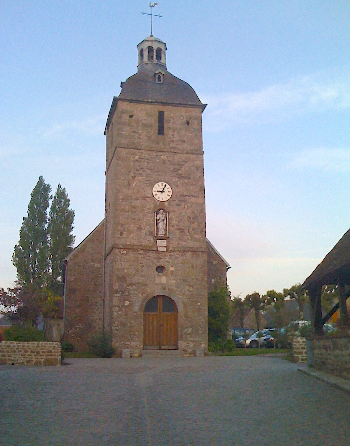 Eglise de la forêt Auvray dans l'Orne.